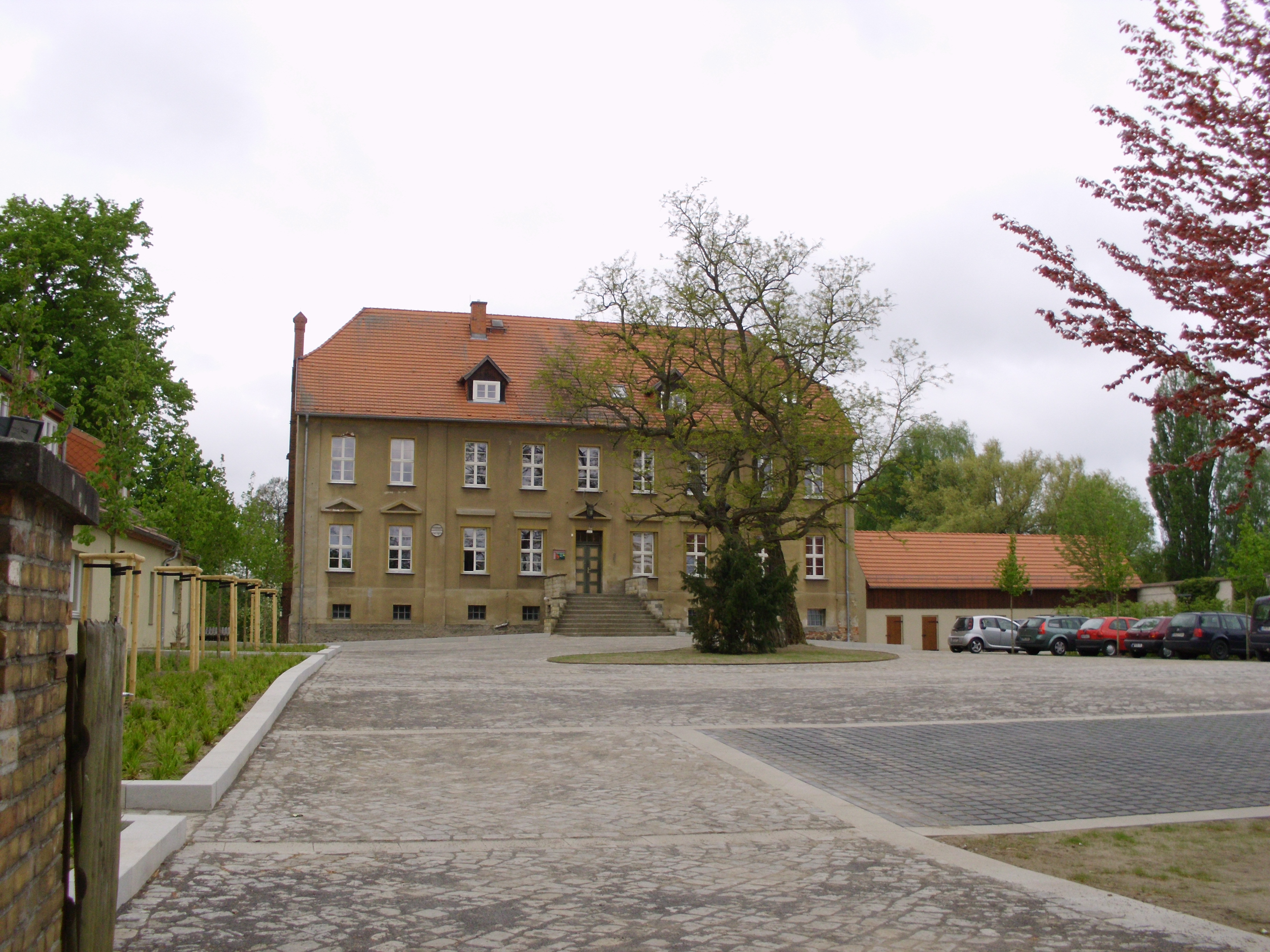 Ortsteil Alt Ruppin, Friedrich-Engels-Straße 33a, Neuruppin, Brandenburg, Deutschland Das ehemalige Amtshaus wurde 1791 erbaut. Davor stand hier die Burg, heute ist das Amt für Forstwirtschaft Alt Ruppin und die Oberförsterei Alt Ruppin in diesem Gebäude untergebracht.